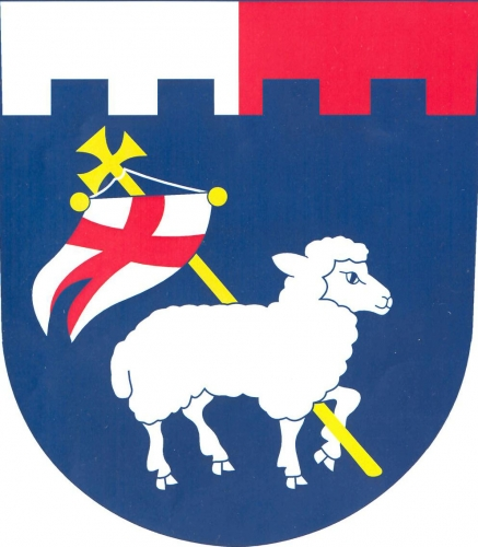 znak, Třebešov, okres Rychnov nad Kněžnou